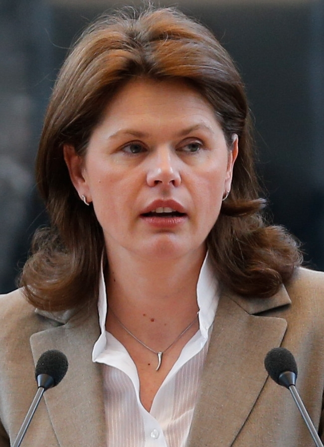 Nastop predsednice vlade Alenke Bratušek v Državnem zboru